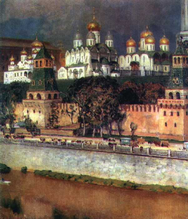 А. М. Васнецов. «Московский Кремль. Соборы». 1894. Холст, масло. 90 × 79. Государственная Третьяковская галерея, Москва.